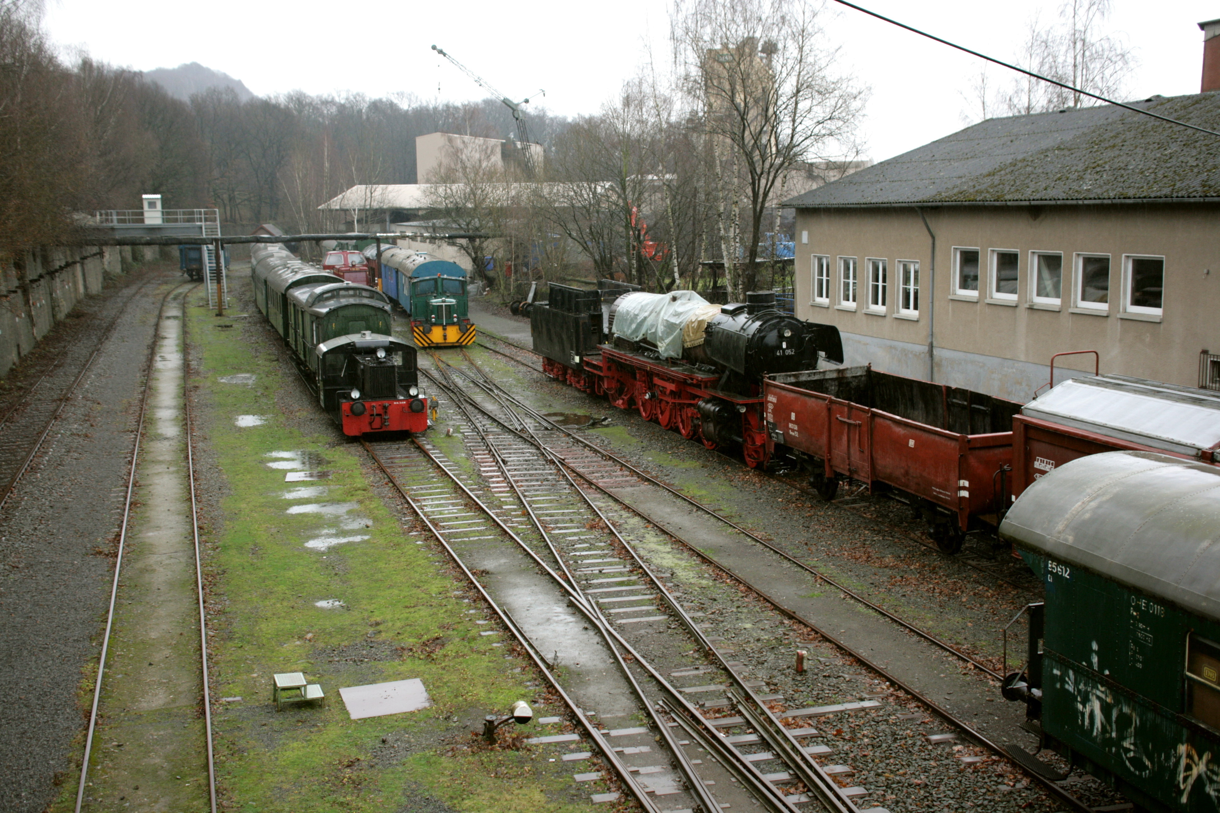 Museum Industriekultur in Osnabrück